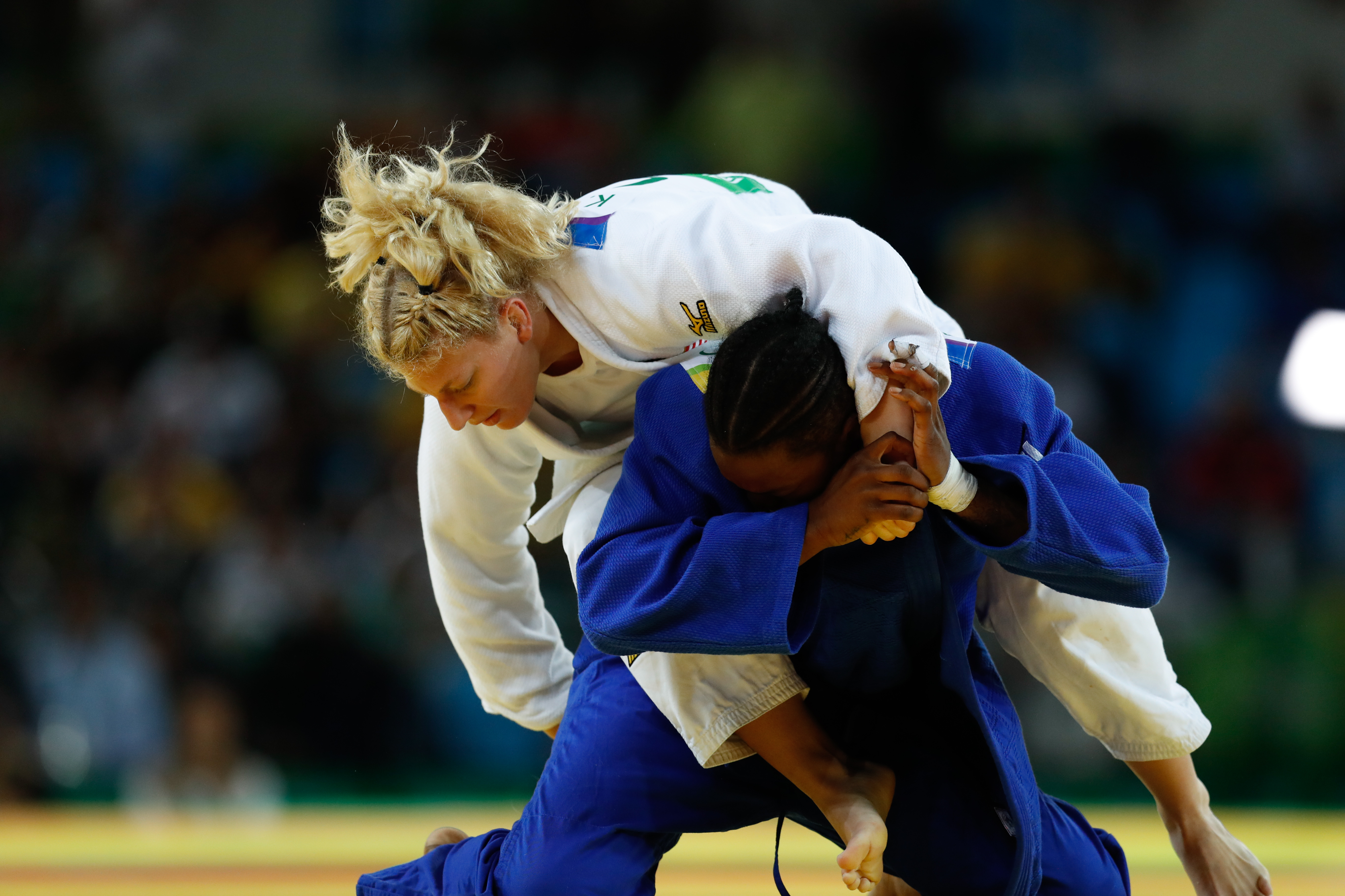 Rio de Janeiro - A judoca norte-americana Kayla Harrison vence a francesa Audrey Tcheumeo na categoria até 78 quilos e ganha medalha de ouro na Rio 2016 (Fernando Frazão/Agência Brasil)